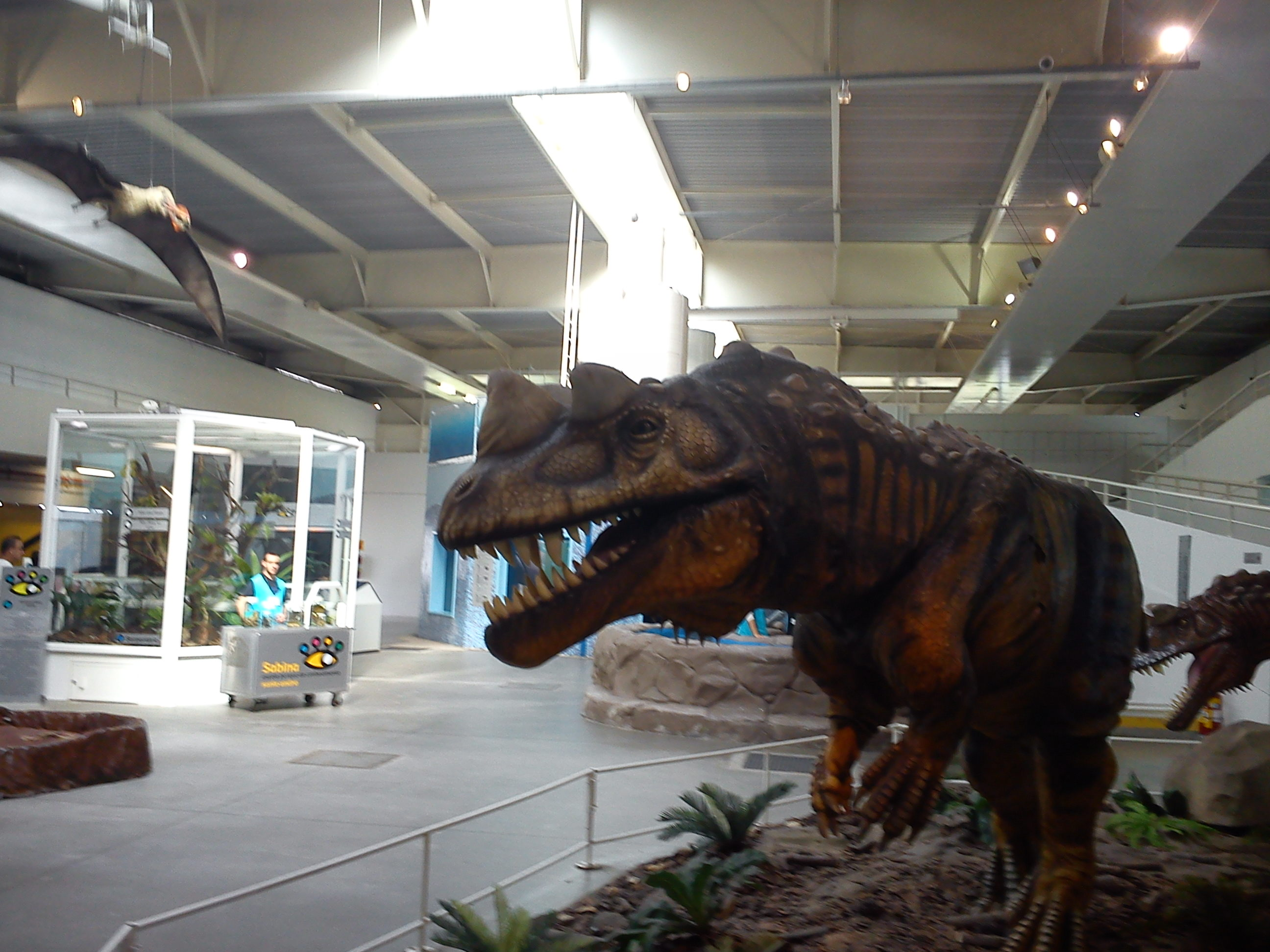 Sabina Escola Parque do Conhecimento in Santo André, Brazil.